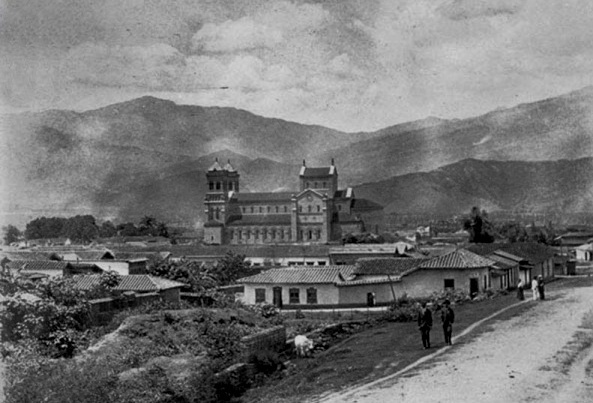 Vista de la Catedral Metropolitana de Medellín en el año de 1922, fotógrafo:Alfonso Echavarria. Colombia